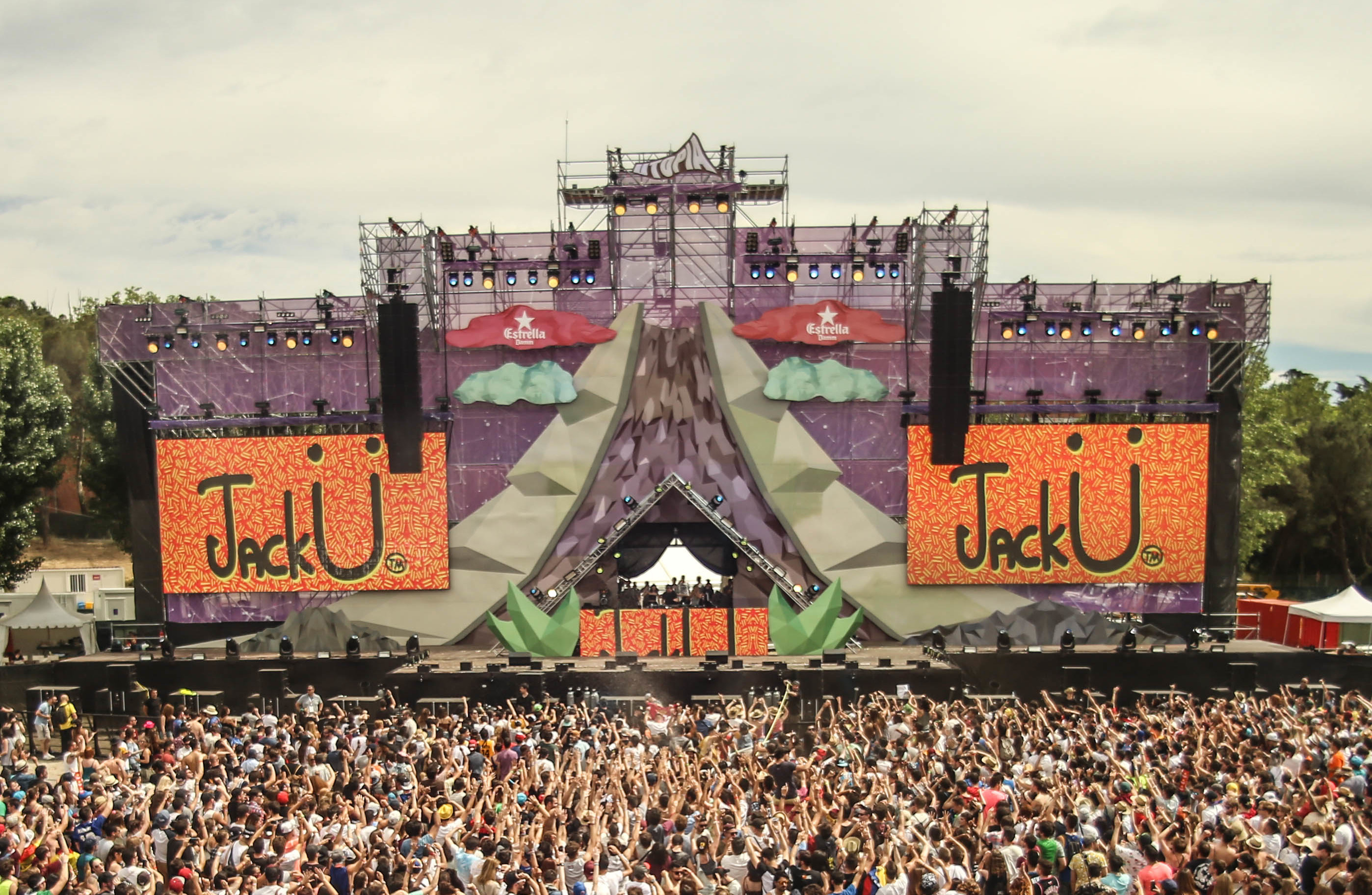 Utopía Festival 2016 (Madrid, España)